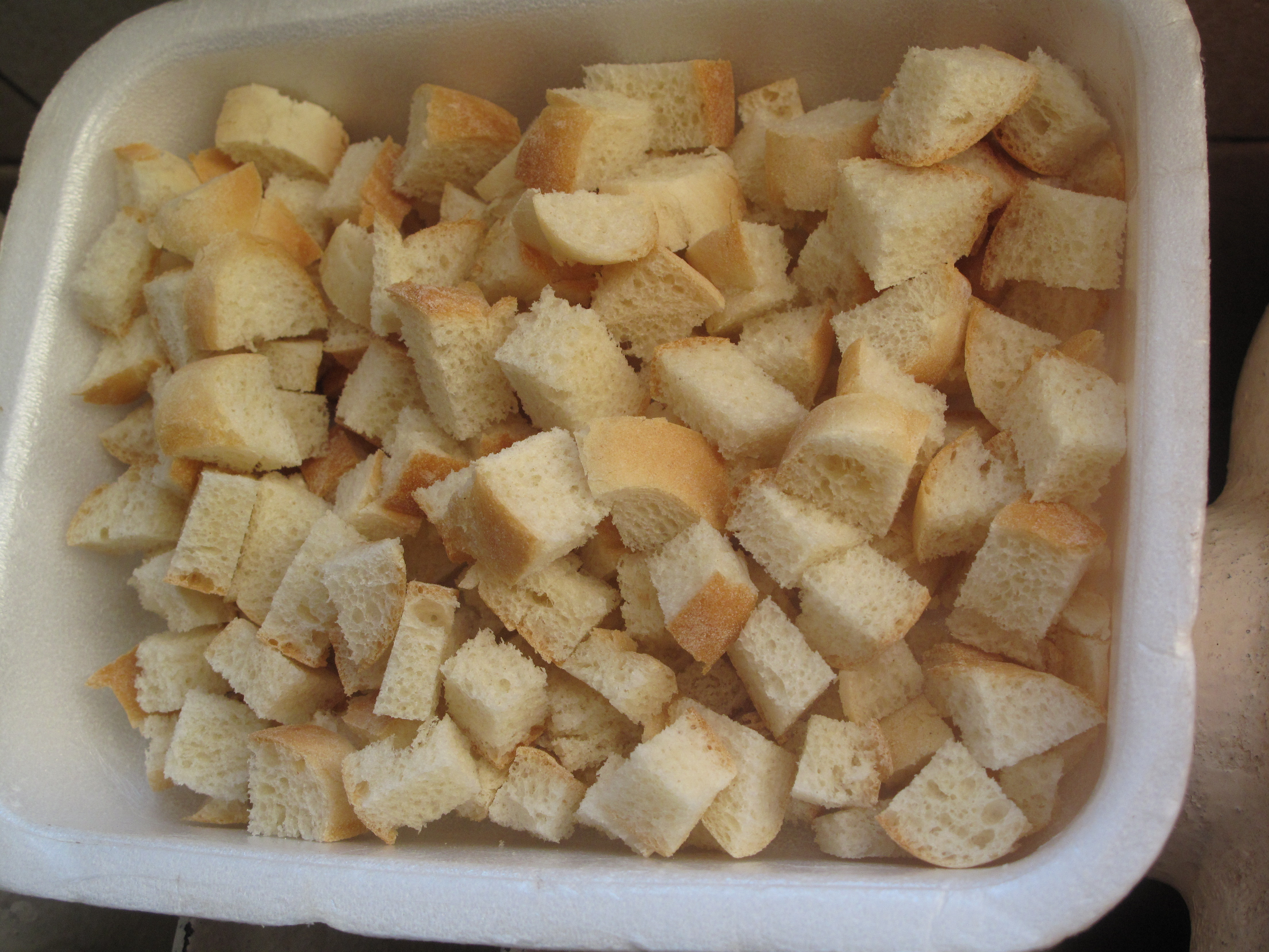 Sušené pečivo